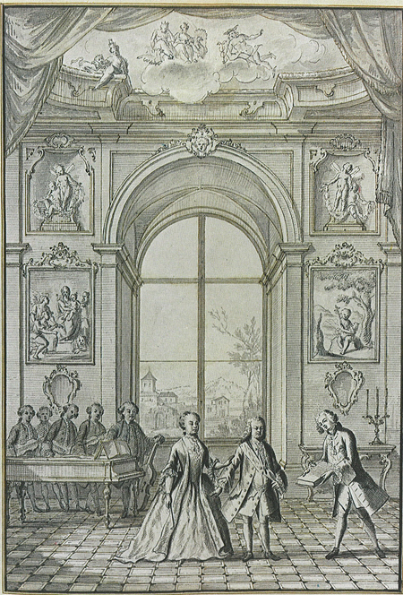 Da sinistra raffigurati i quattro violinisti de "La Orquesta Real del Buen Retiro": Terri, Facco, Manalt e Marquesini, accanto a loro, con il violoncello, Domenico Porretti. In primo piano Farinelli con Fernando VI e consorte.